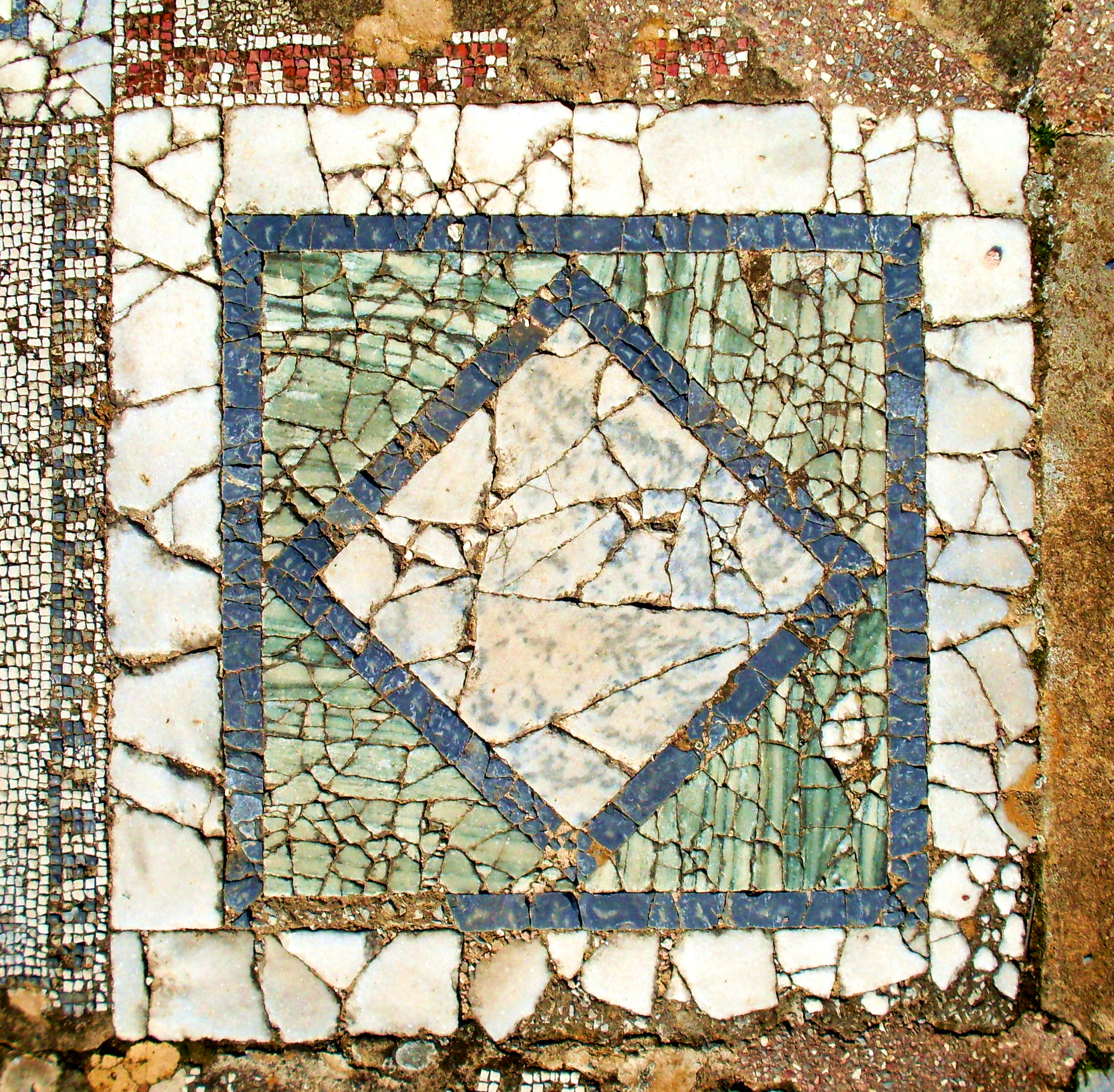 Panneau de la mosaïque des cheveau: opus sectile